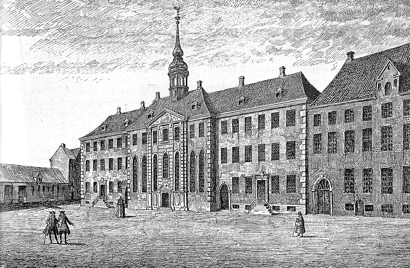 Vajsenhust på Nytorv i København fra 1700'tallet